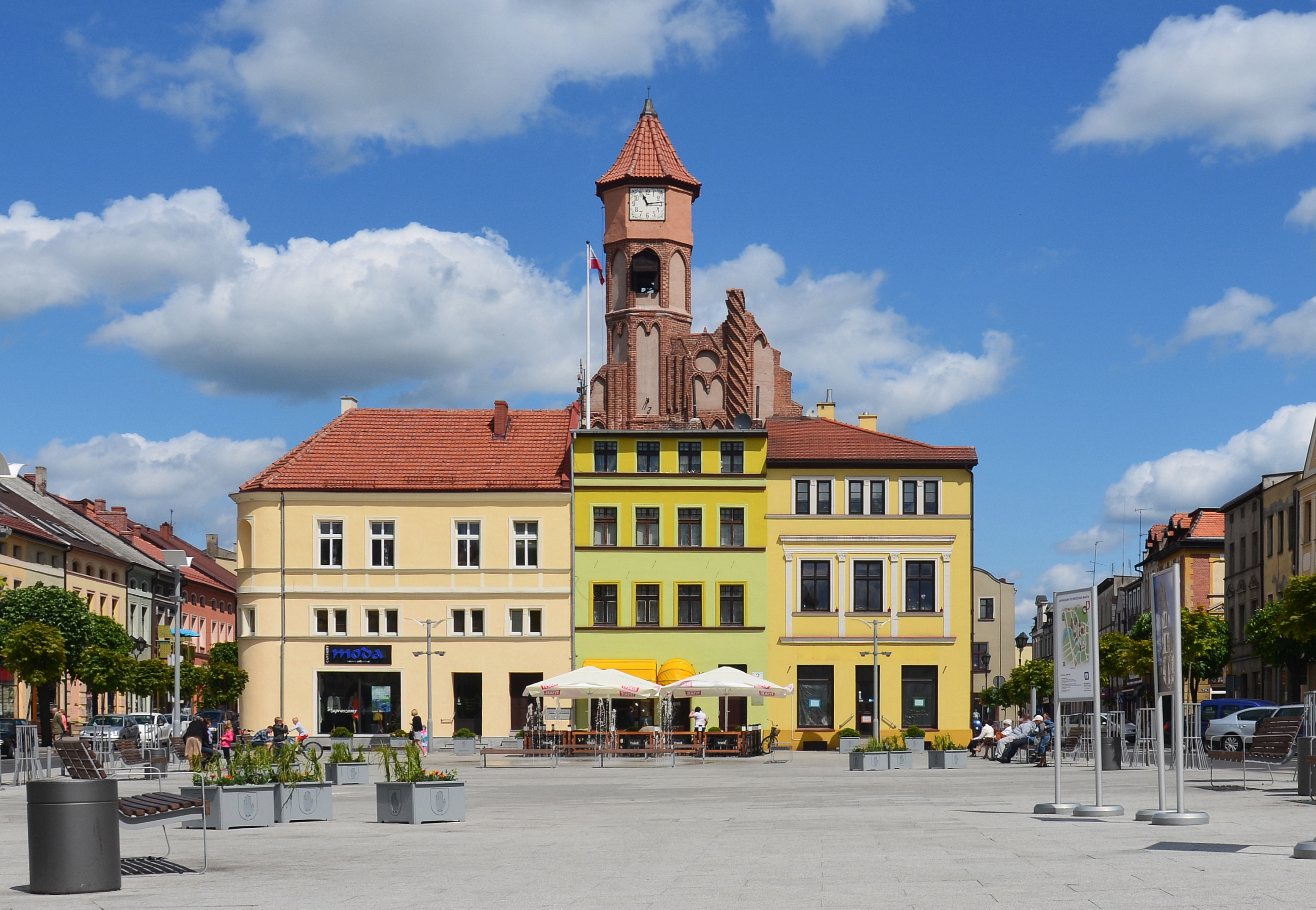 Brodnica, budynek dawnego ratusza miejskiego